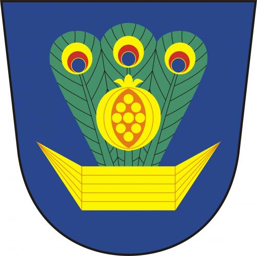 znak, Korkyně, okres Příbram